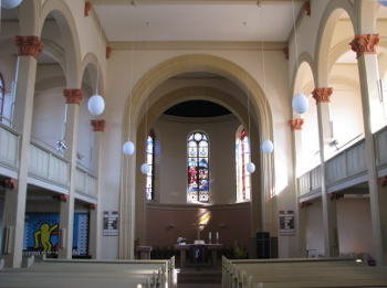 Evangelische Kirche in Heddesheim.